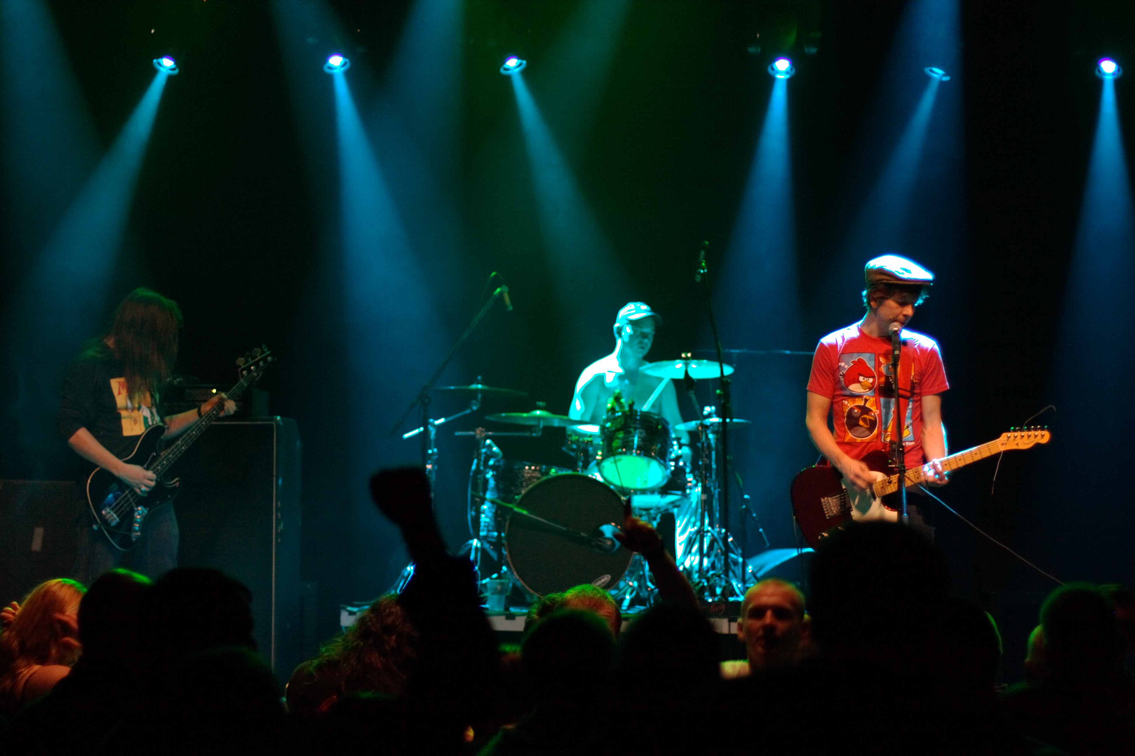 Villu 49 @ Rock Cafe, Tallinn